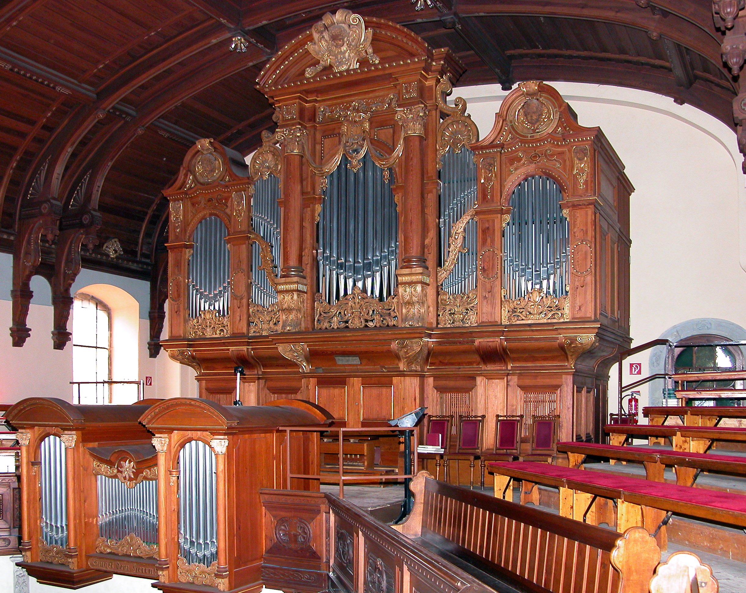 31.03.2005 01187 Dresden-Altplauen, Reckestraße 6 (GMP: 51.028935,13.704658): Ev.-Luth. Auferstehungskirche. 700jährige Vorgeschichte mit vielen Umbauten. Früher hieß sie Michaeliskirche. Nach dem letzten großen Erweiterungsbau erhielt sie 1903 den Namen Auferstehungskirche. Architekten waren William Lossow und Hermann Viehweger. Neorenaissance mit Jugendstilelementen. Einzigartige Eichenholzdecke. Blick zur Eule-Orgel von 1985. [DSCN6153.TIF]20050331106DR.JPG(c)Blobelt